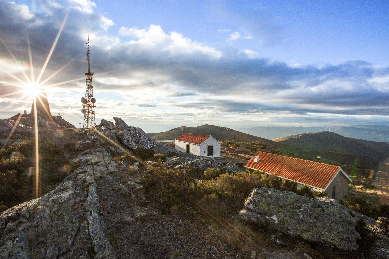 Amarante Serra do Marão Senhora da Serra